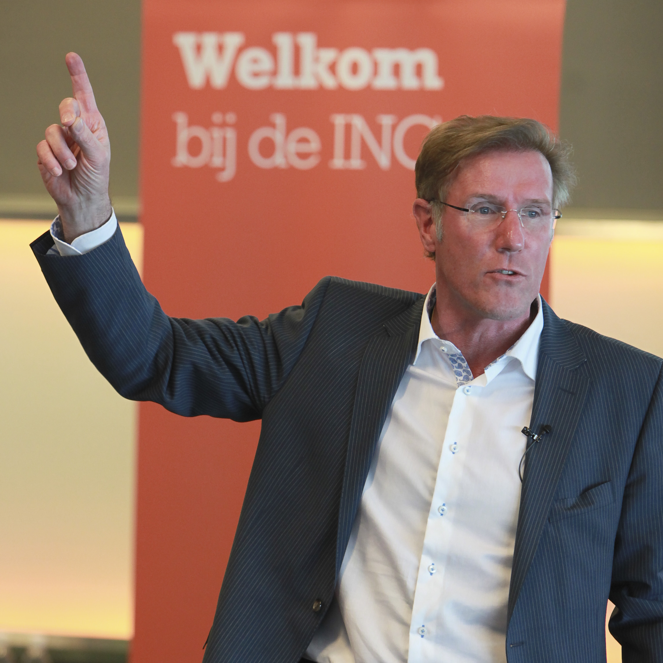 Voormalig doelman Hans van Breukelen tijdens een door de ING georganiseerde Week van de Ondernemer